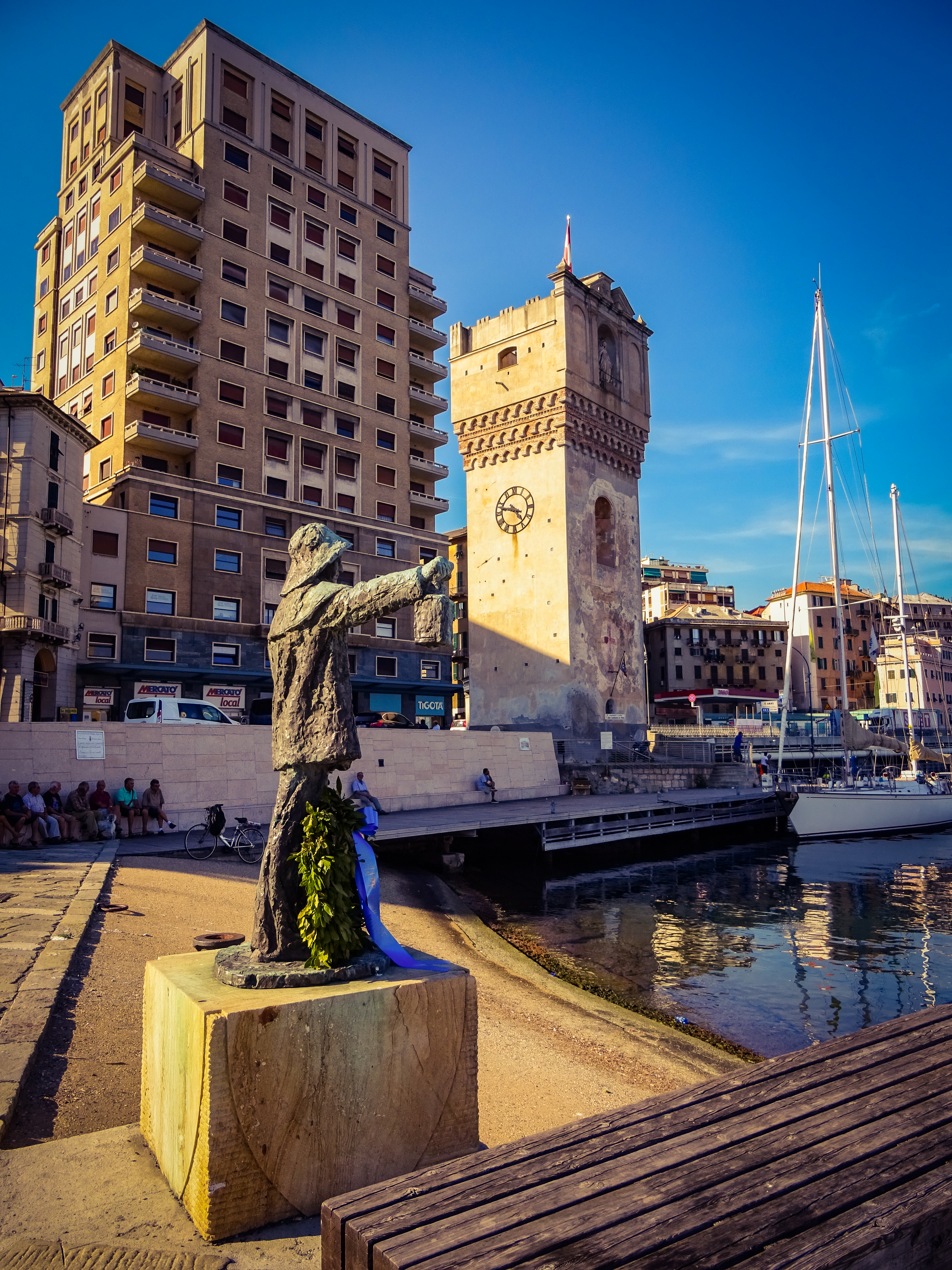 Anticamente chiamata Torre della Quarda, è citata per la prima volta in un documento del 1392 e faceva parte della cinta muraria a protezione della città. La torre è diventata uno dei simboli della città e dedicata a Leon Pancaldo, navigatore savonese che accompagnò Ferdinando Magellano durante la sua prima circumnavigazione intorno al mondo. This is a photo of a monument which is part of cultural heritage of Italy.